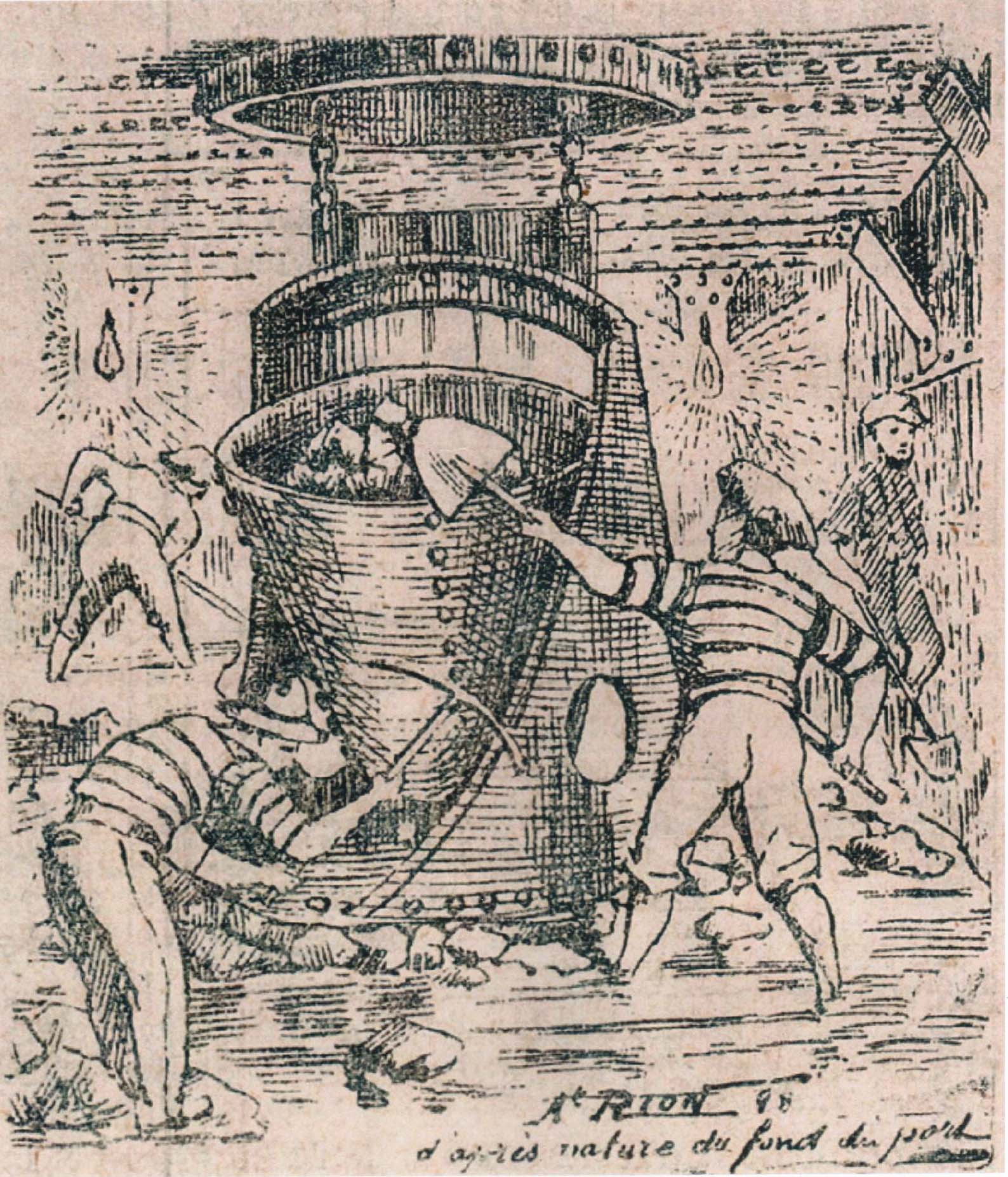 Ouvriers travaillant au fond du caisson à air comprimé sur le chantier du quai des charbons au port de Nice Gravure de Rion publiée dans le quotidien "le petit Niçois", dix-neuvième année - n°322